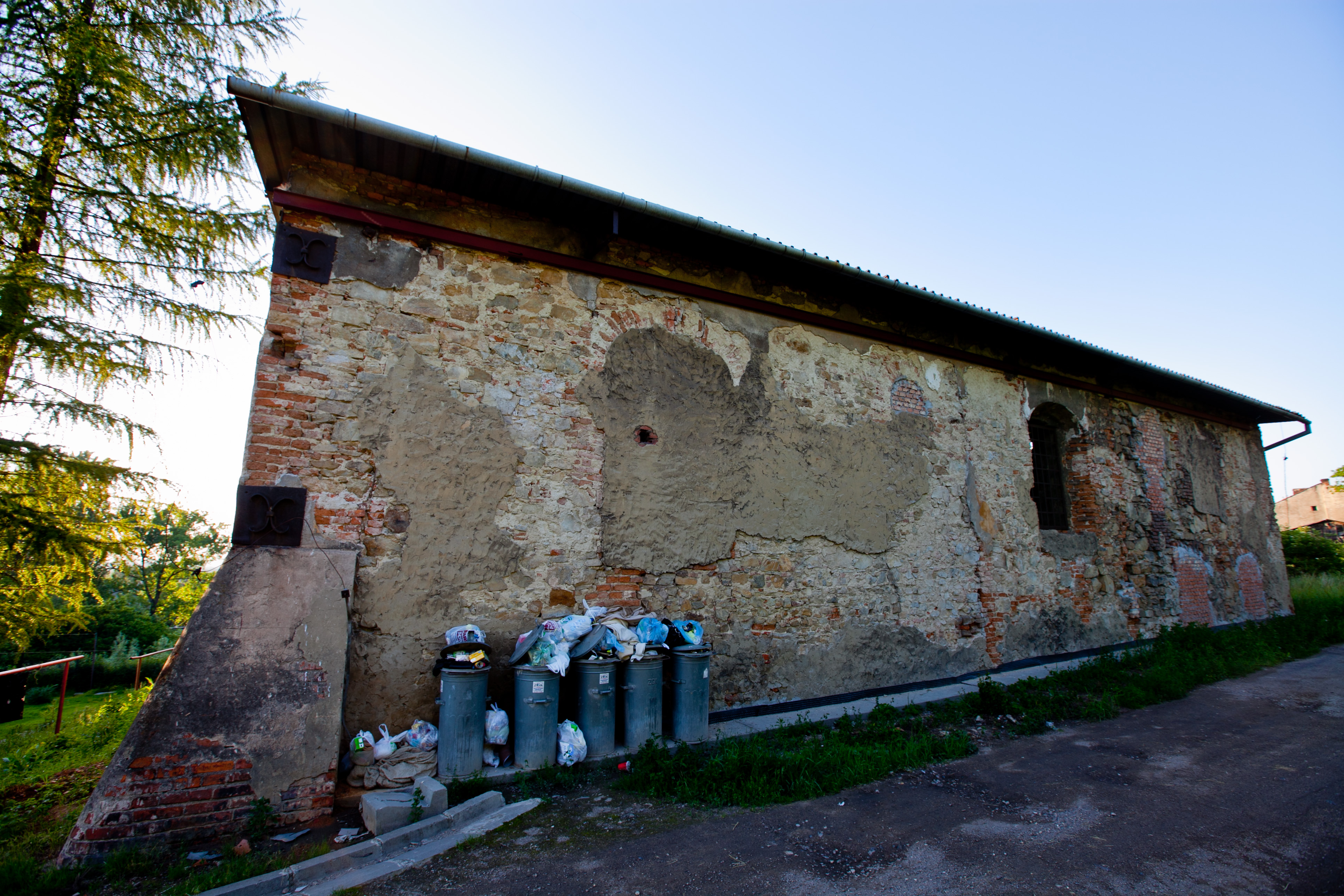 Stara Synagoga w Wieliczce, ul. Wiejska 11, dzielnica Klasno, ściana wschodnia